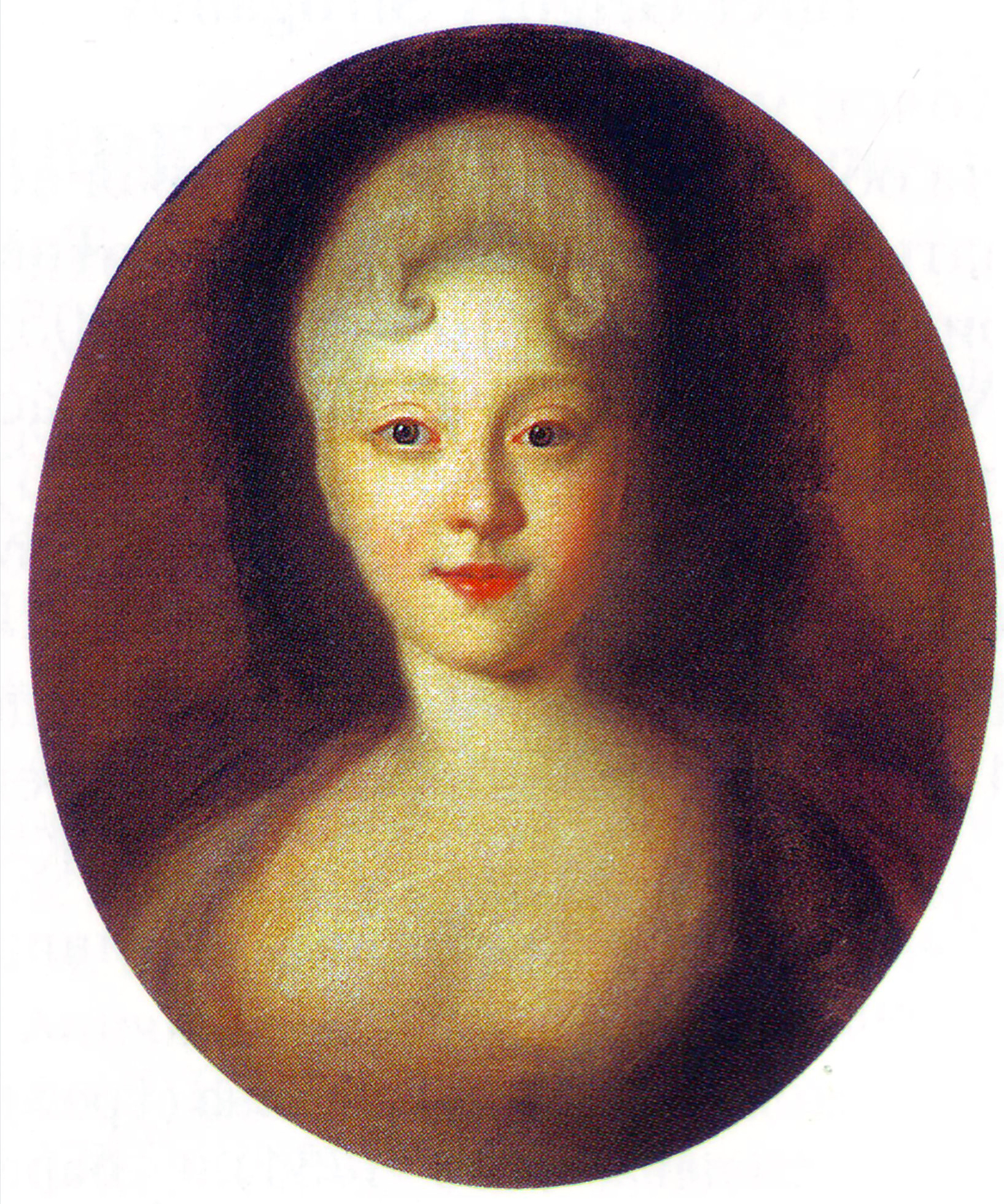 Цесаревна Елизавета Петровна, будущая императрица (1741-1761). Неоконченный портрет. 1720-е годы. Русский музей